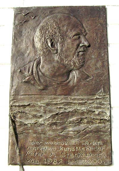 Lia krol,2005